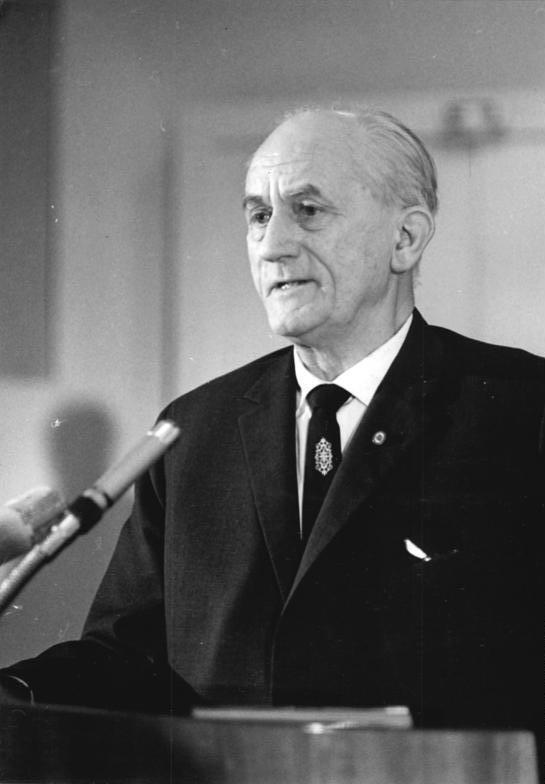 Zentralbild Franke 14.11.1966 Die 1. Jahreskonferenz des Deutschen Schriftstellerverbandes fand in der Zeit vom 2.11. - 4.11.66 in der Kongreßhalle am Berliner Alexanderplatz statt. 350 Teilnehmer der Konferenz (Schriftsteller, junge Autoren, schreibende Arbeiter, Literaturwissenschaftler und Bibliothekare) berieten über die Entwicklung der sozialistischen deutschen Nationalliteratur. UBz: Prof. Alfred Kurella während seines Diskussionsbeitrages.